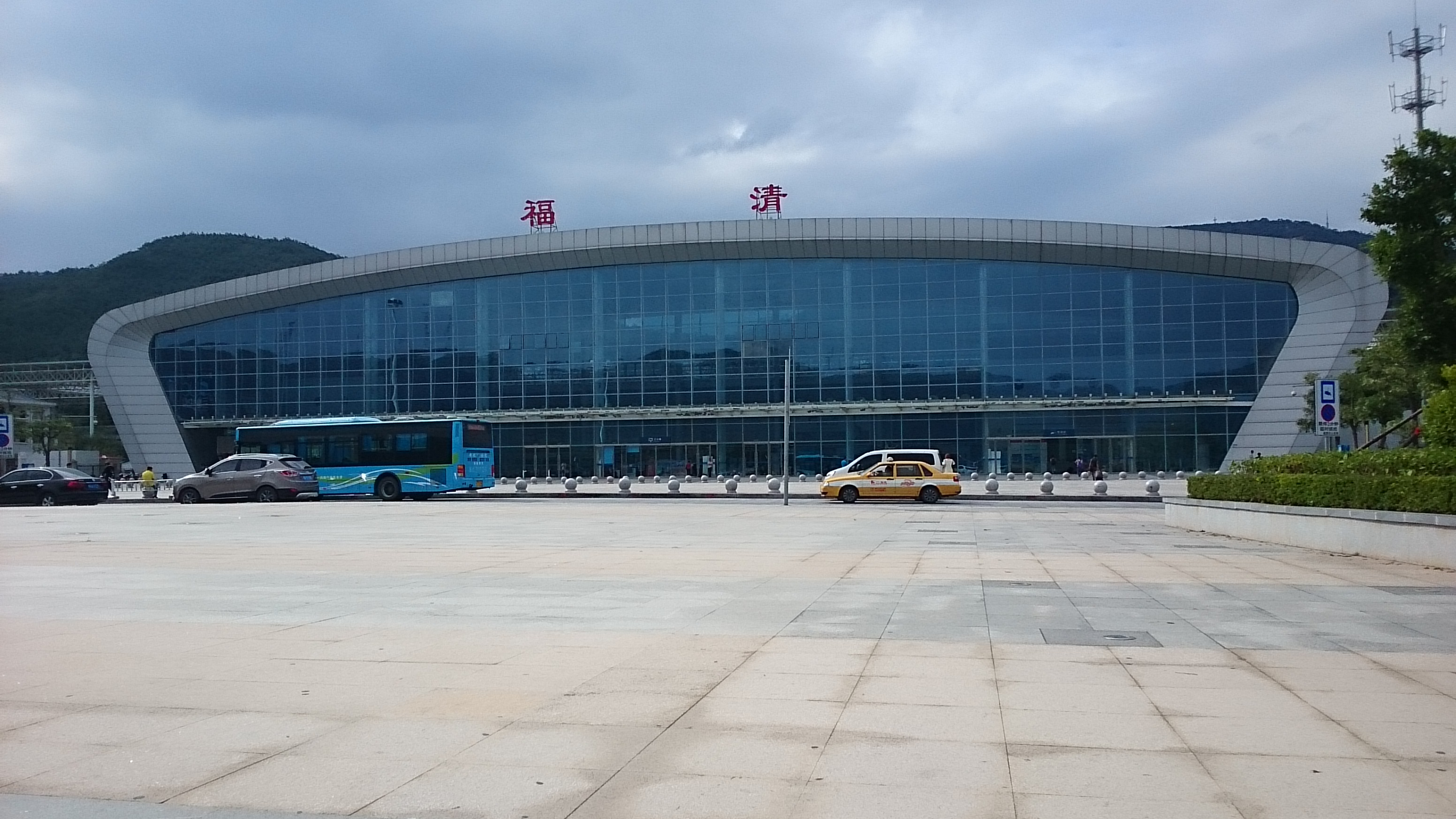 中文（中国大陆）: 福清站